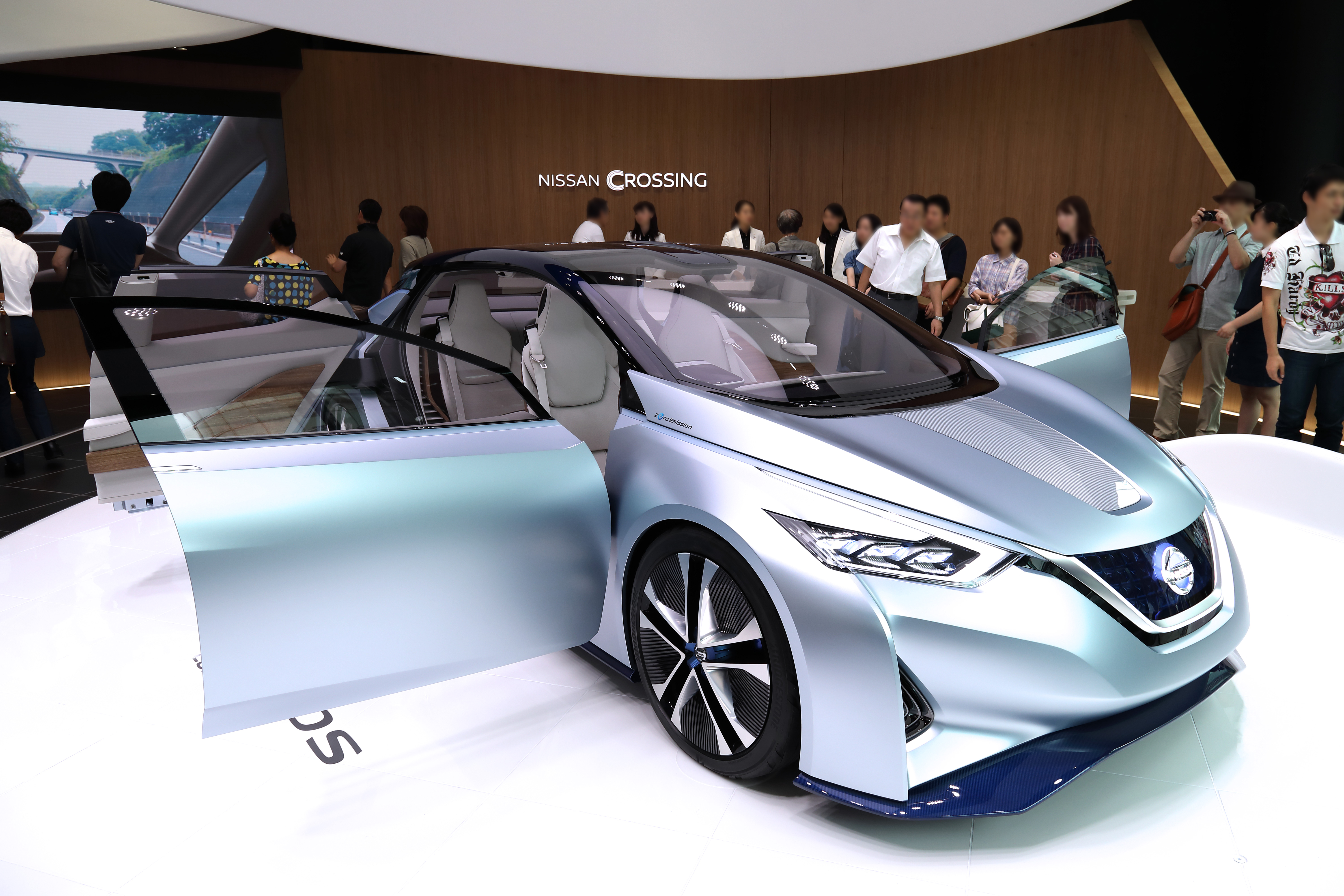 日産自動車のコンセプトカー「IDSコンセプト」